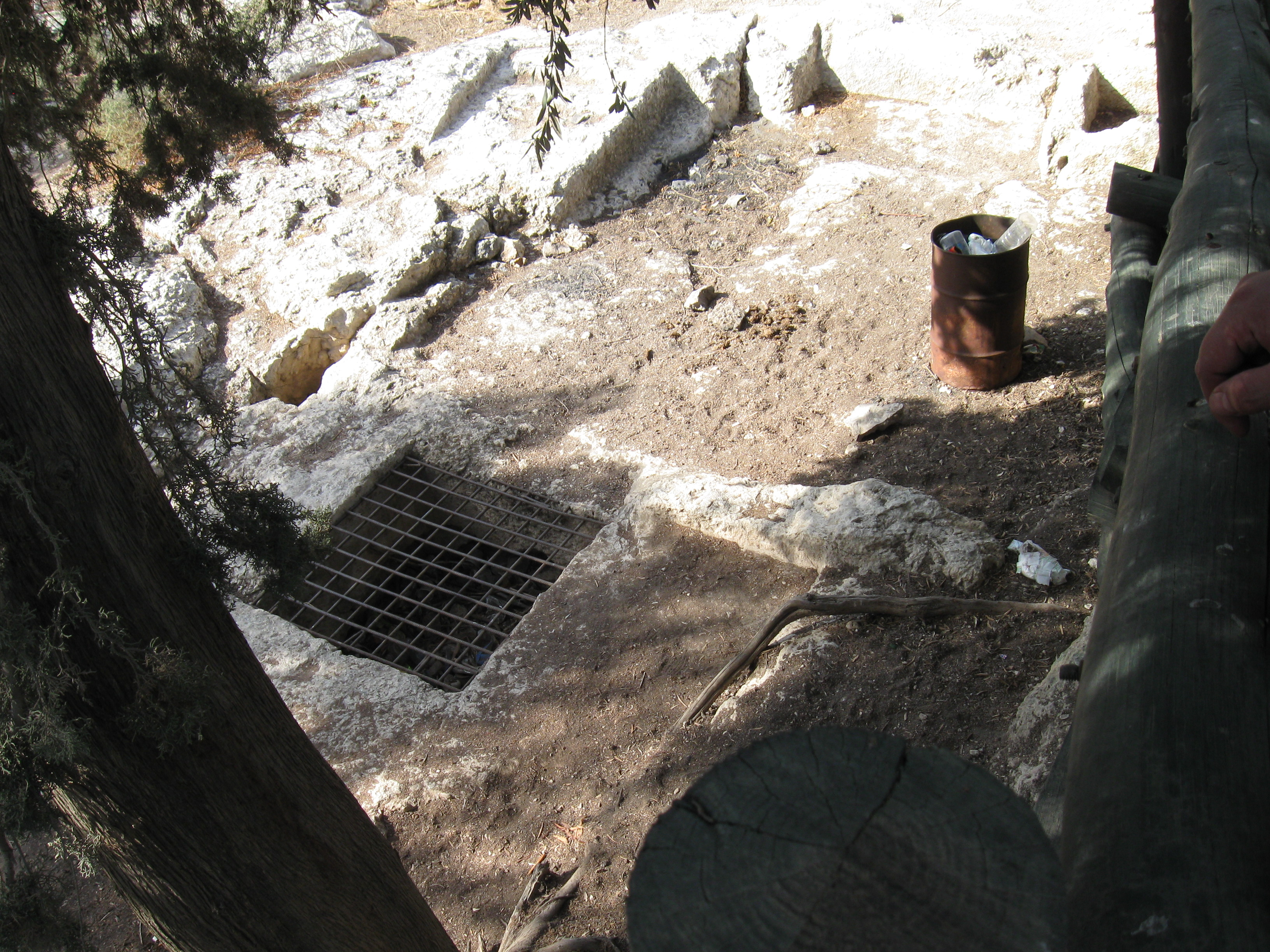 הגת בראש תל צרעה